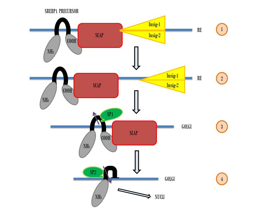 Activació de SREBP1